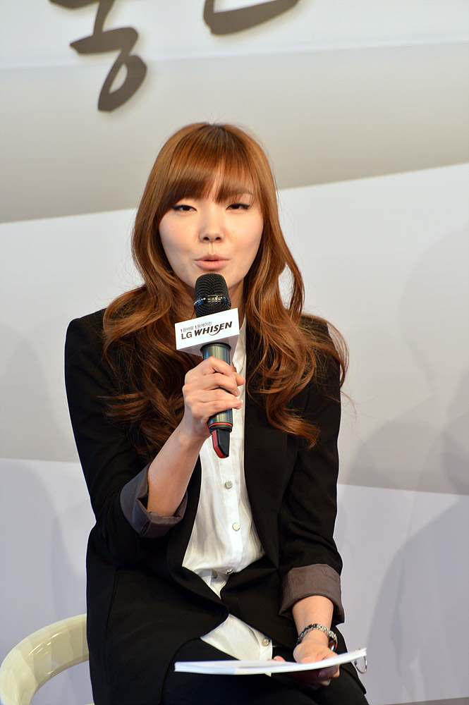 LG전자가 5월 21일 여의도 ‘서울 마리나 클럽&요트’에서 ‘조인성-정혜경과 함께하는 LG 휘센 좋은바람쇼’를 개최했다. 이 날 행사 진행은 최근 큰 인기를 얻고 있는 개그우먼 신보라가 맡았다. ※ LG전자 뉴스룸 에서 관련 보도자료를 확인실 수 있습니다.